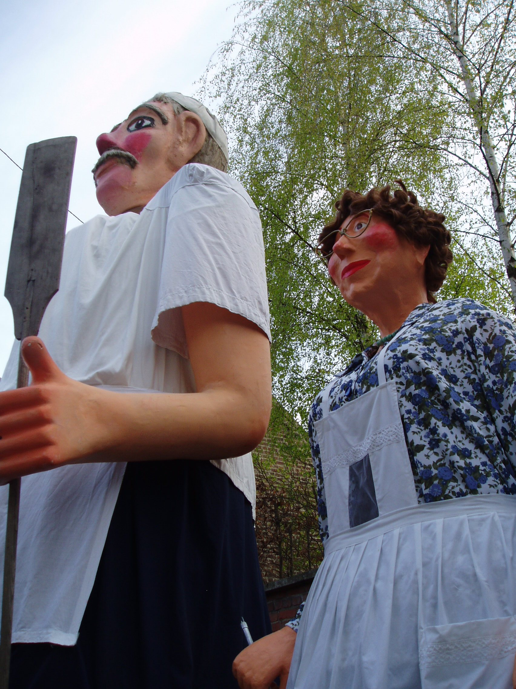 Les géants Jeannot le boulanger et Julia la cantinière d'Oudezeele